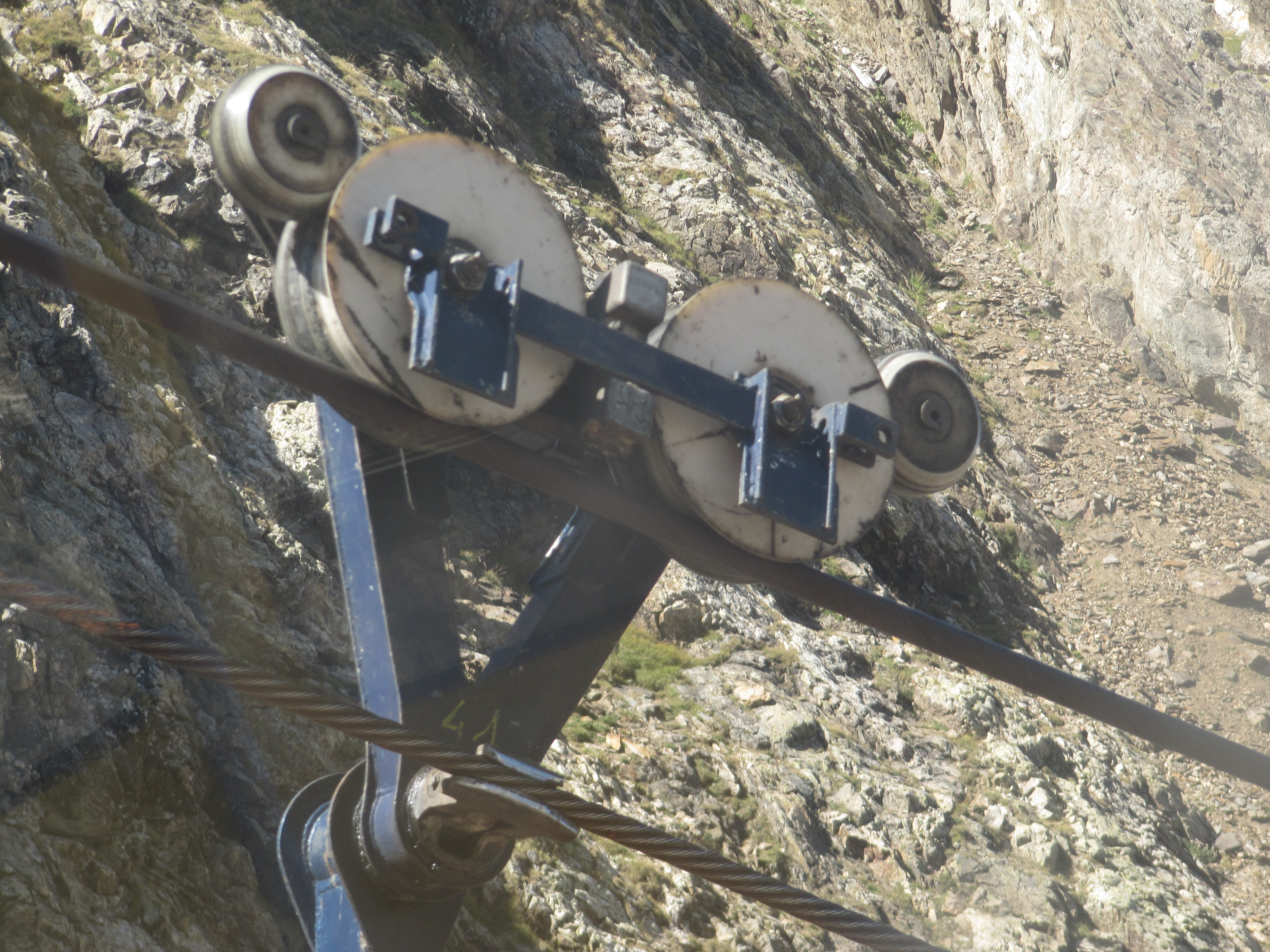 Chariot du 2S Pulsé de la Grave 2